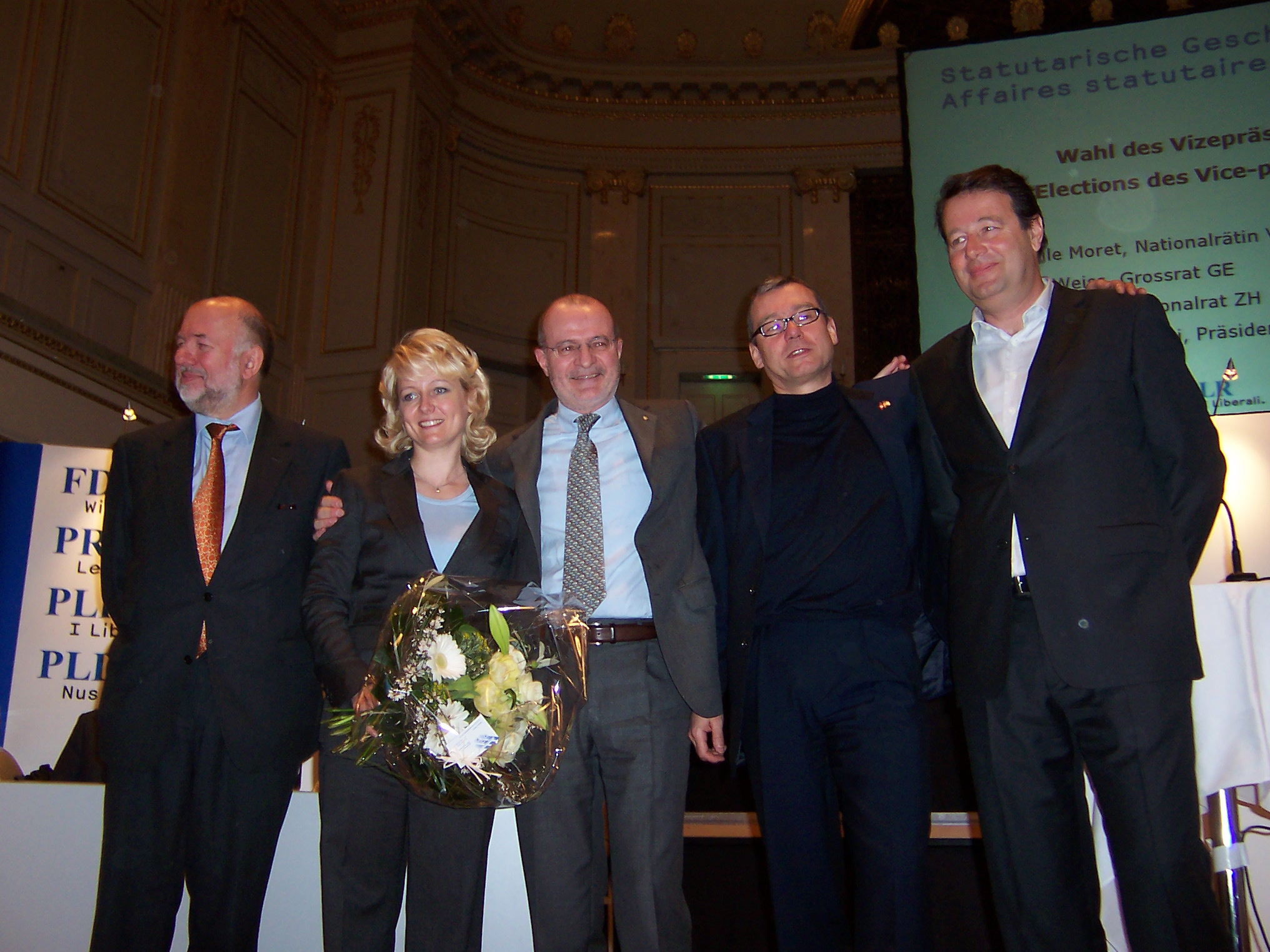 Präsidium der «FDP. Die Liberalen», Pierre Weiss, Isabelle Moret, Fulvio Pelli, Ruedi Noser, Vincenzo Pedrazzini), gewählt am 28. Februar 2009 in Bern.